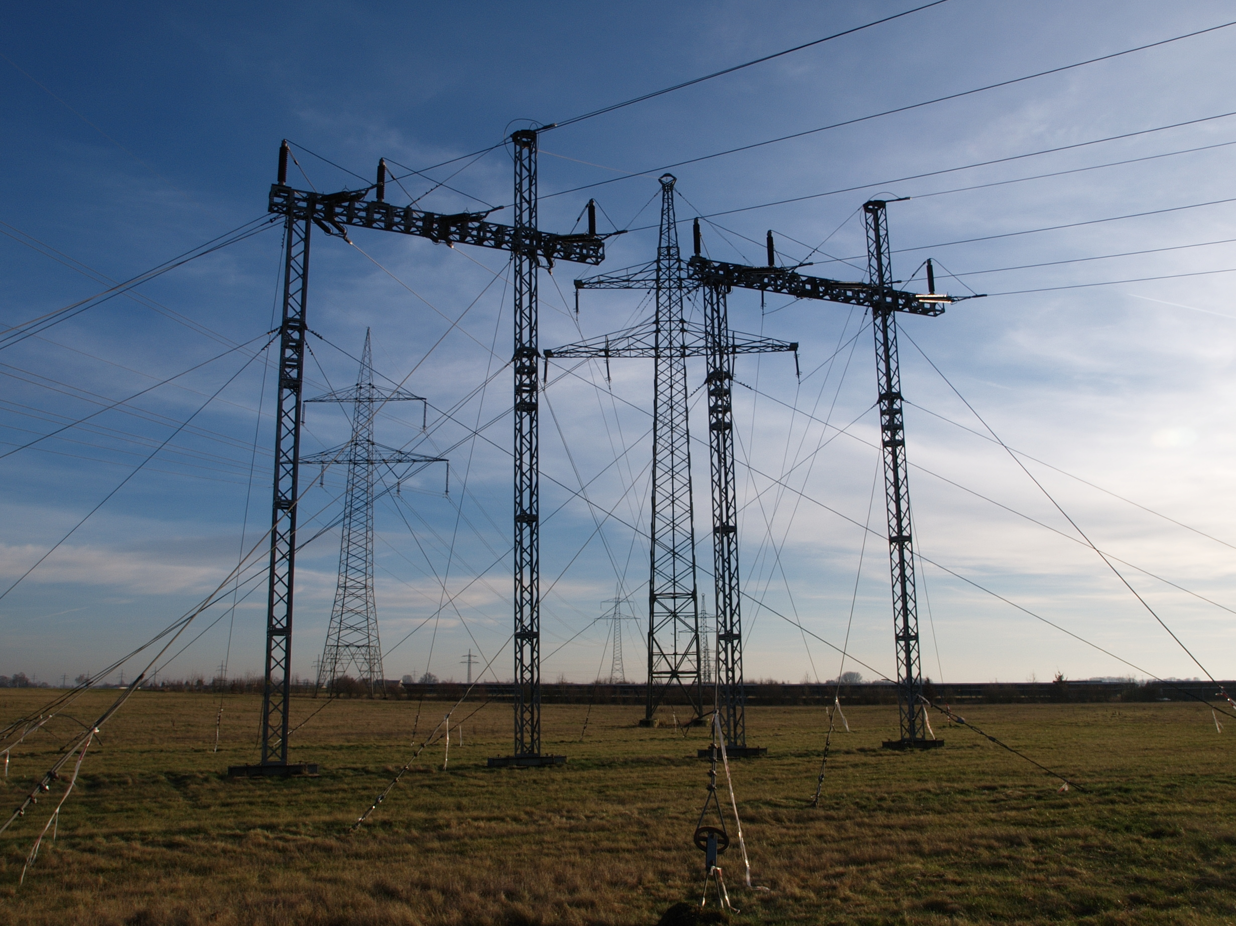 Masten der provisorisch verlegten 110-kV-Hochspannungsleitung beim Solarfeld Gänsdorf